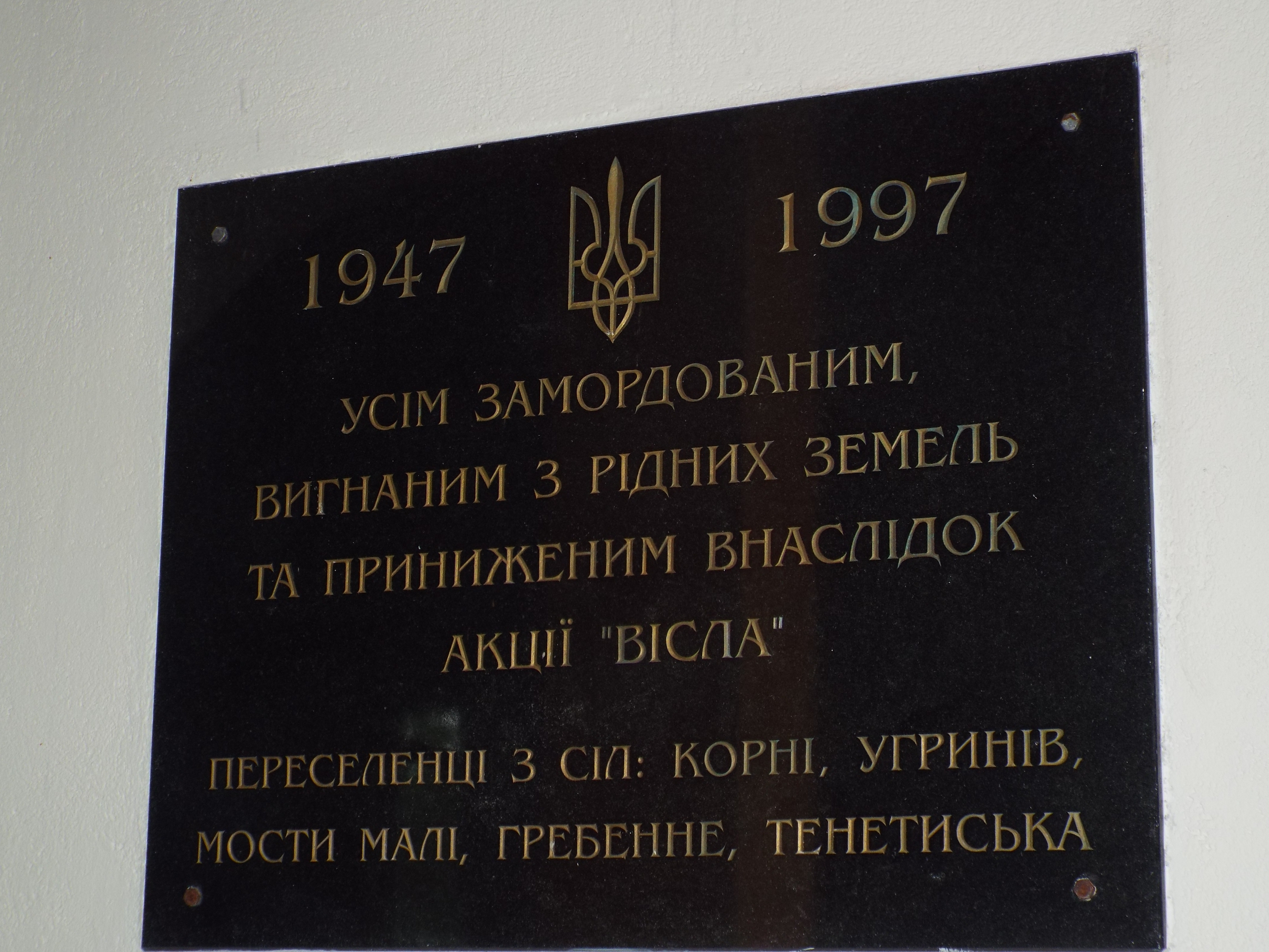 Меморіальна дошка в пам'ять про виселених в ході Акції "Вісла" українців. Греко-католицька церква св. Миколая в Желіхово-Циганку. Фото Івана Парнікози, 2019 р.